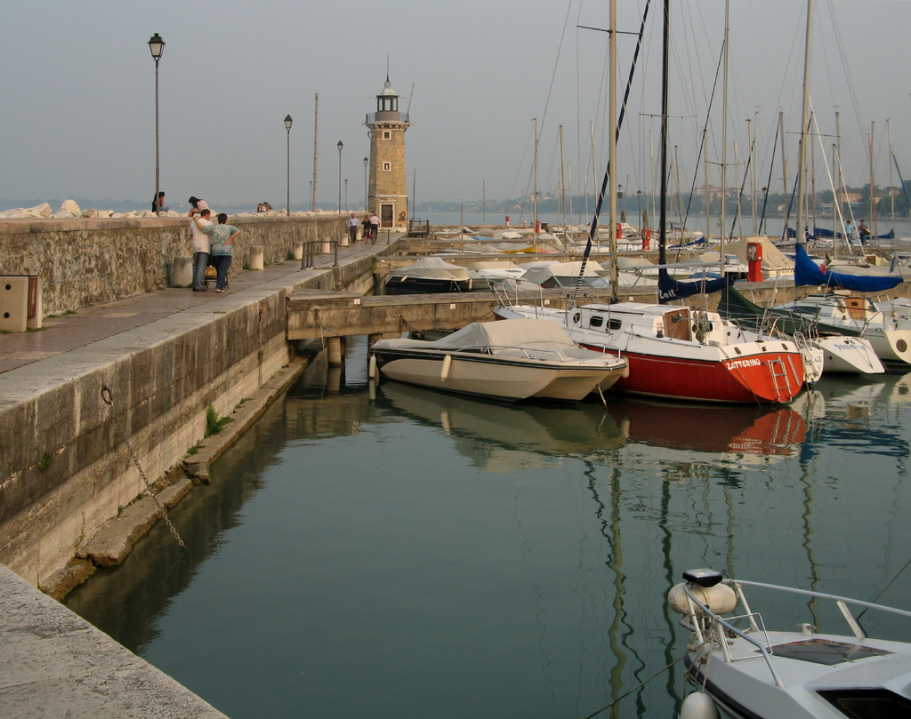 Desenzano harbor bulwark, Lake Garda/Italy